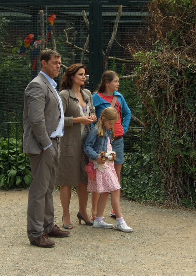 Tierärztin Dr. Mertens, Dreharbeiten im Zoo Leipzig.